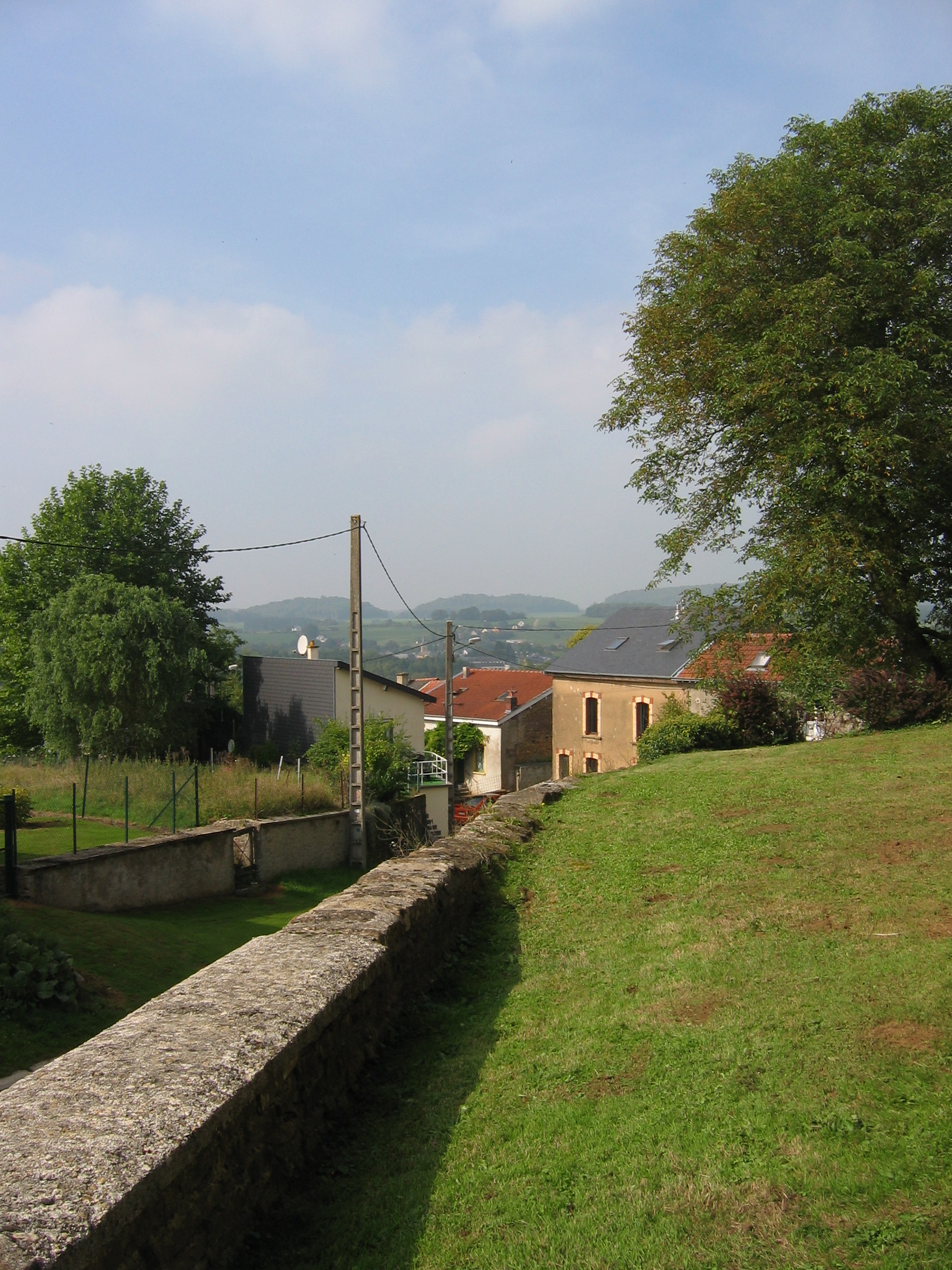 Vue 2 du village de Margny, Ardennes, France